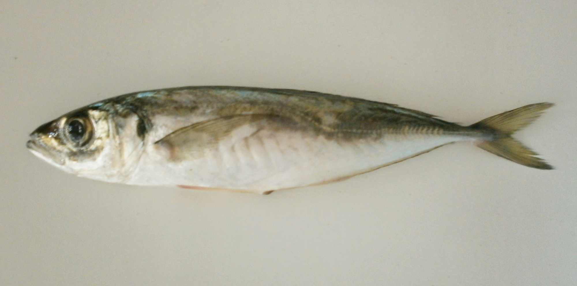 Jurel blanco o mediterráneo (Trachurus mediterraneus)